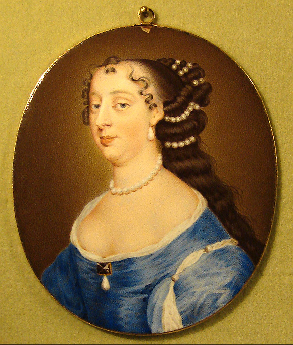 Lady Castlemaine (1641—1709), miniature i emalje signeret af Paul Prieur 1669, Rosenborg Slot, København